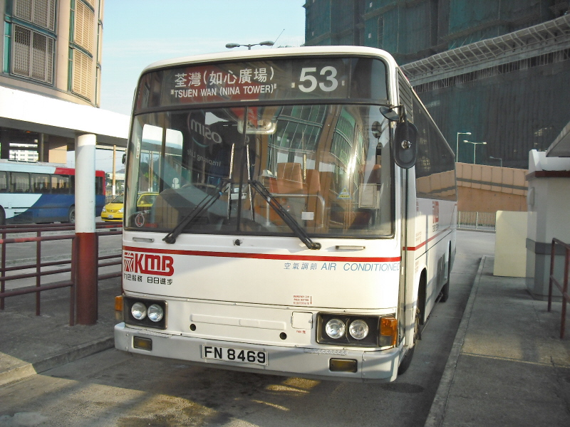 九巴53線巴士，2009年1月4日攝於元朗東巴士總站